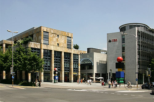 Zug: Metalli und UBS